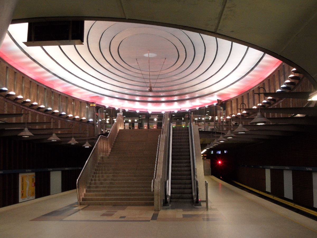 Warszawa - Metro - Stacja Plac Wilsona